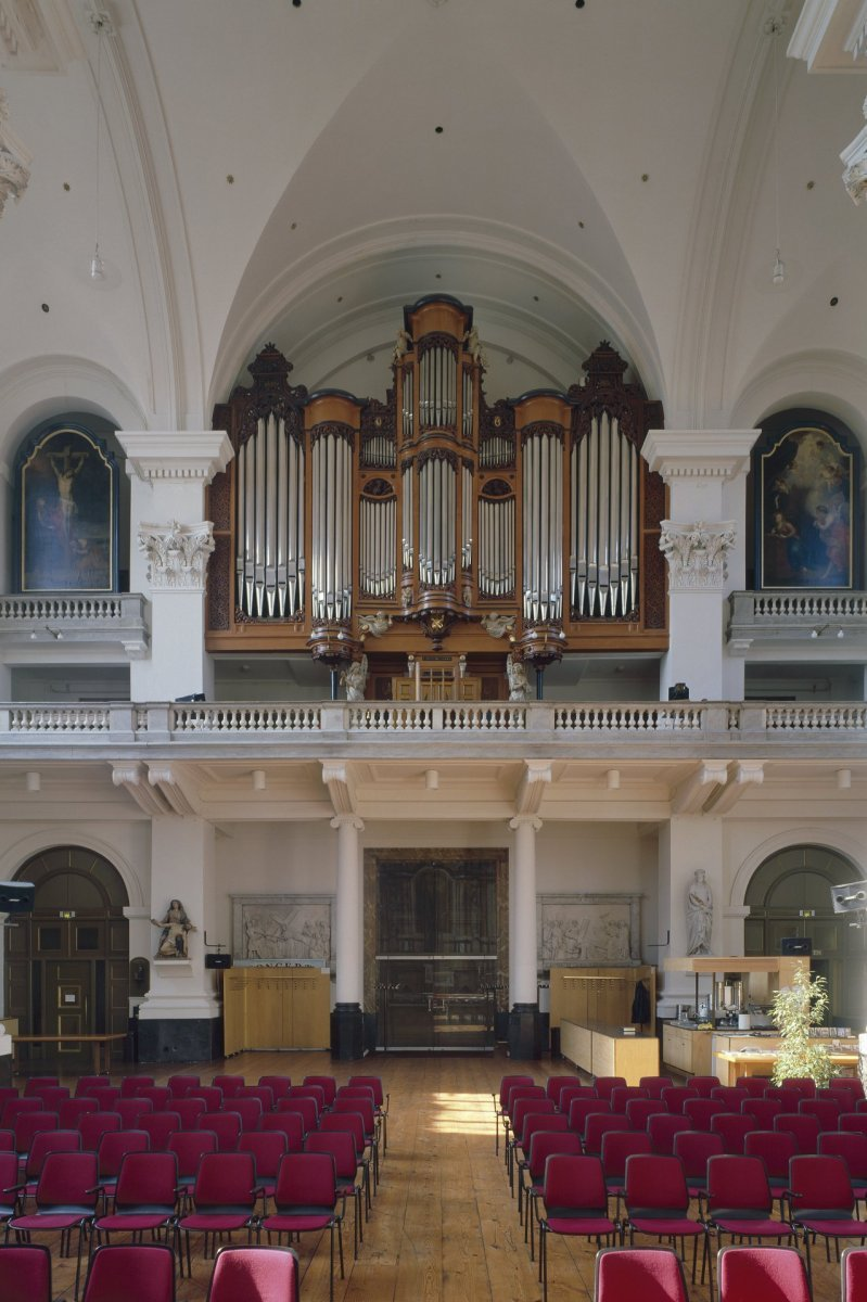 Mozes en Aäronkerk: Interieur, aanzicht westgevel met orgel, orgelnummer 76 (opmerking: Gefotografeerd voor Het Historische Orgel in Nederland 1865-1872)